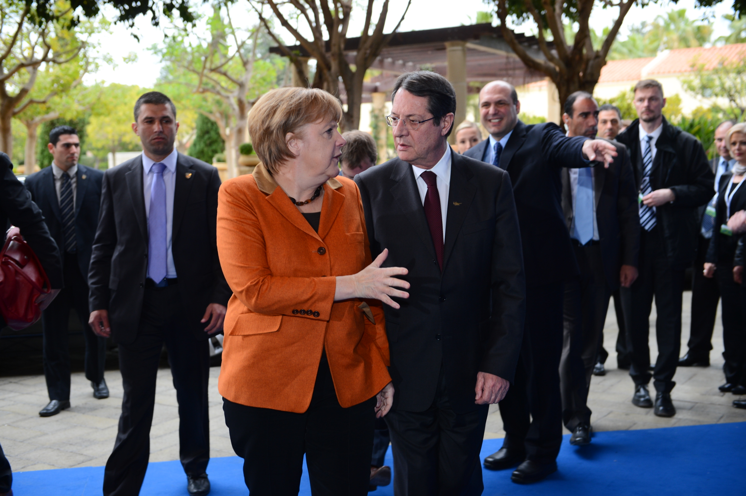 Angela Merkel